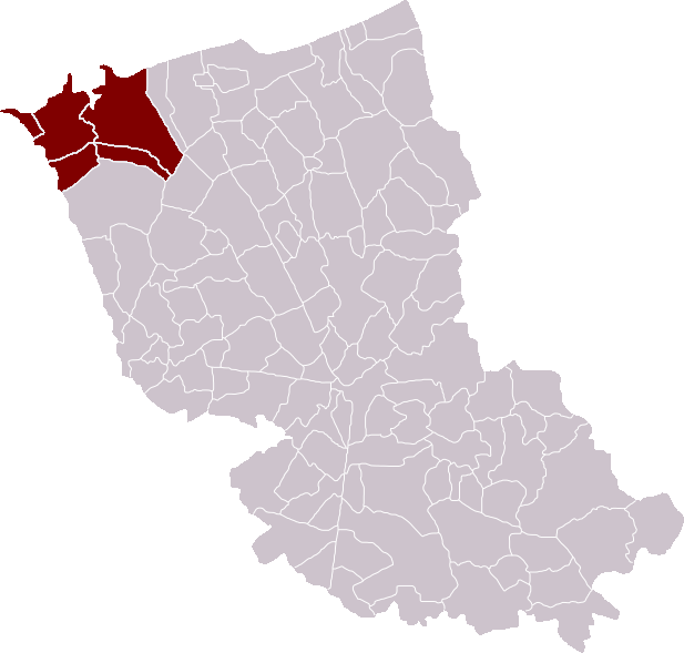 Locatie Kanton Grevelingen in het arrondissement Duinkerke, Frankrijk - zelfgemaakt Location Canton of Gravelines in the Dunkirk district, France - self made Localisation Canton de Gravelines dans l'arrondissement de Dunkerque, France - fait moi-même